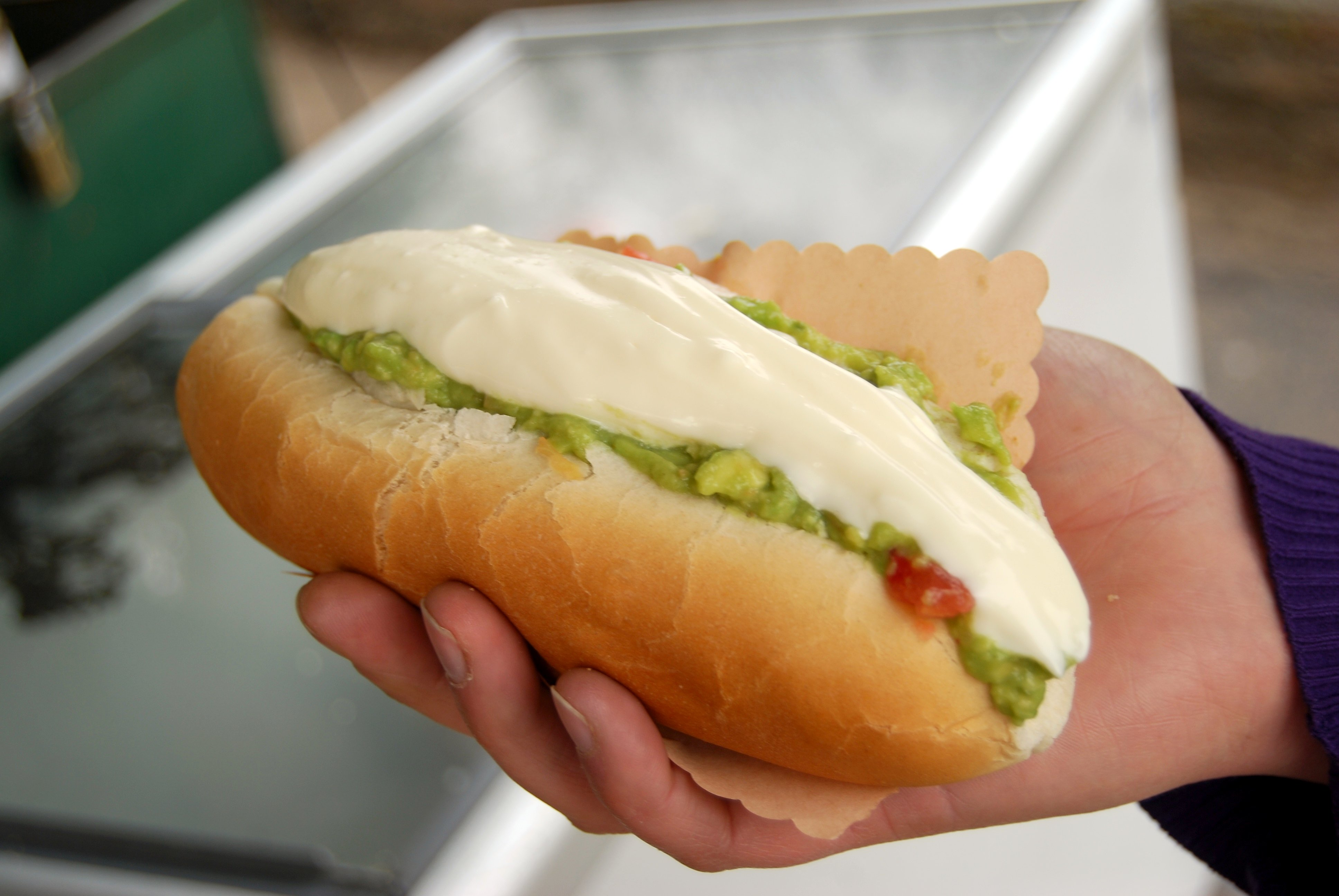 Un completo italiano, plato chileno.